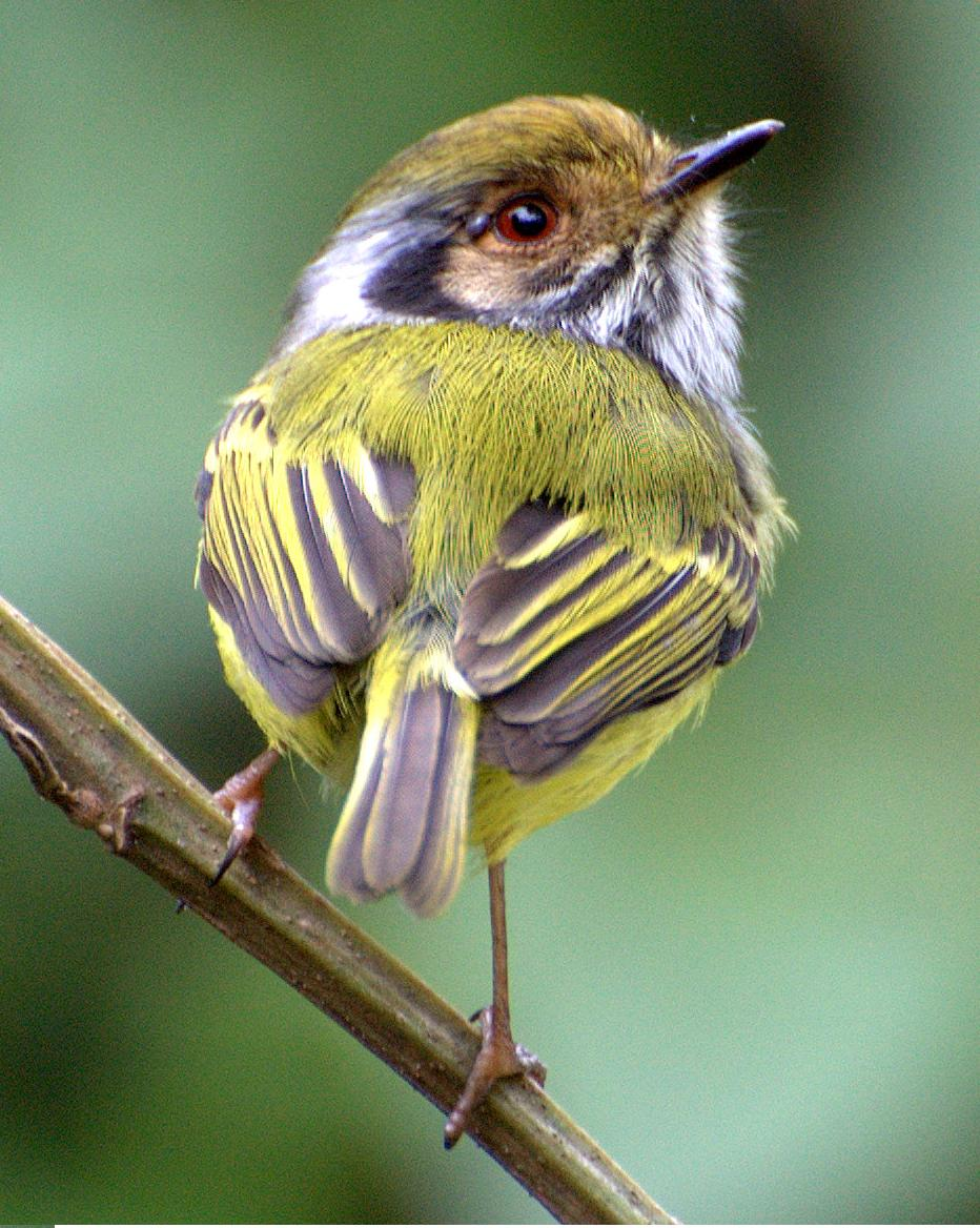 Eared Pygmy-tyrant (Myiornis auricularis) Horto Florestal de São Paulo